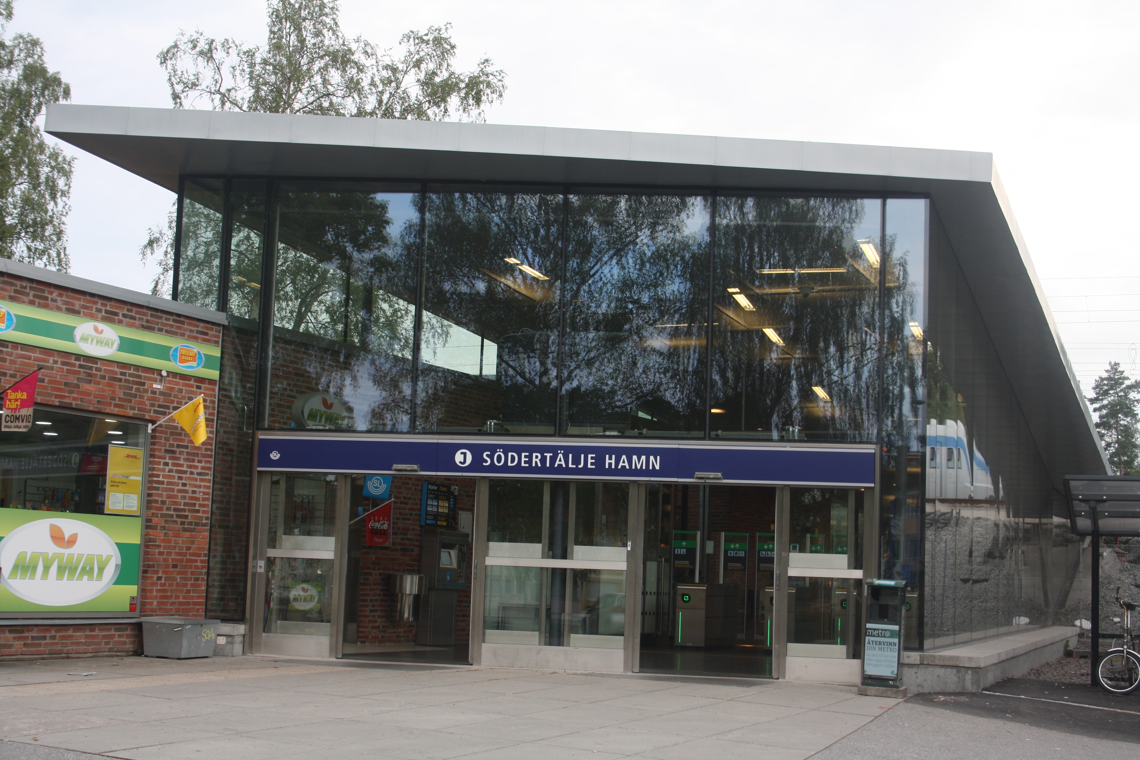 Ingång till Södertälje hamn